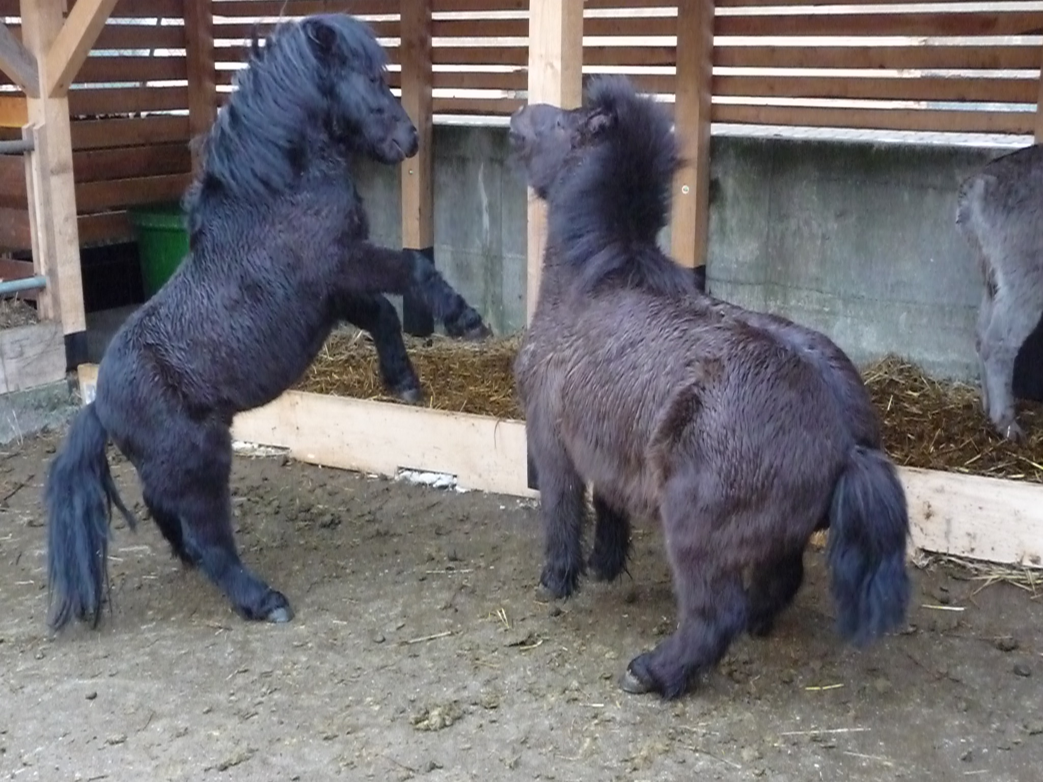 Kämpfende Shetlandponies